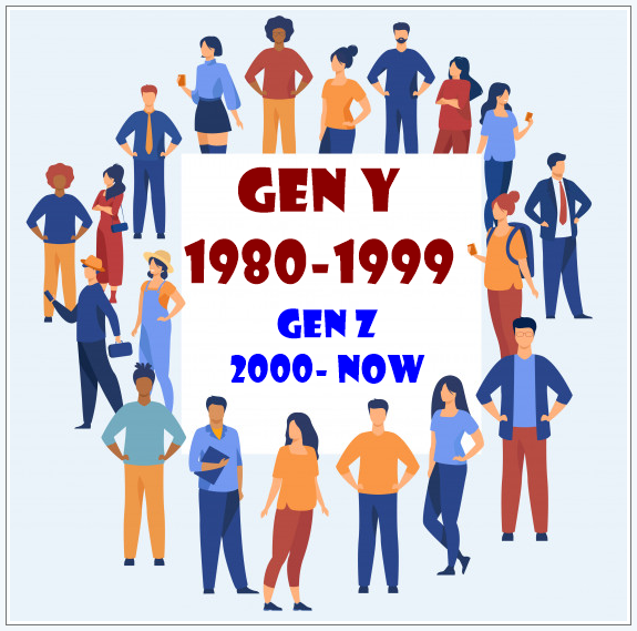 Obrazek przedstawiający zakres dat dotyczących pokolenia ludzi z generacji Y oraz Z